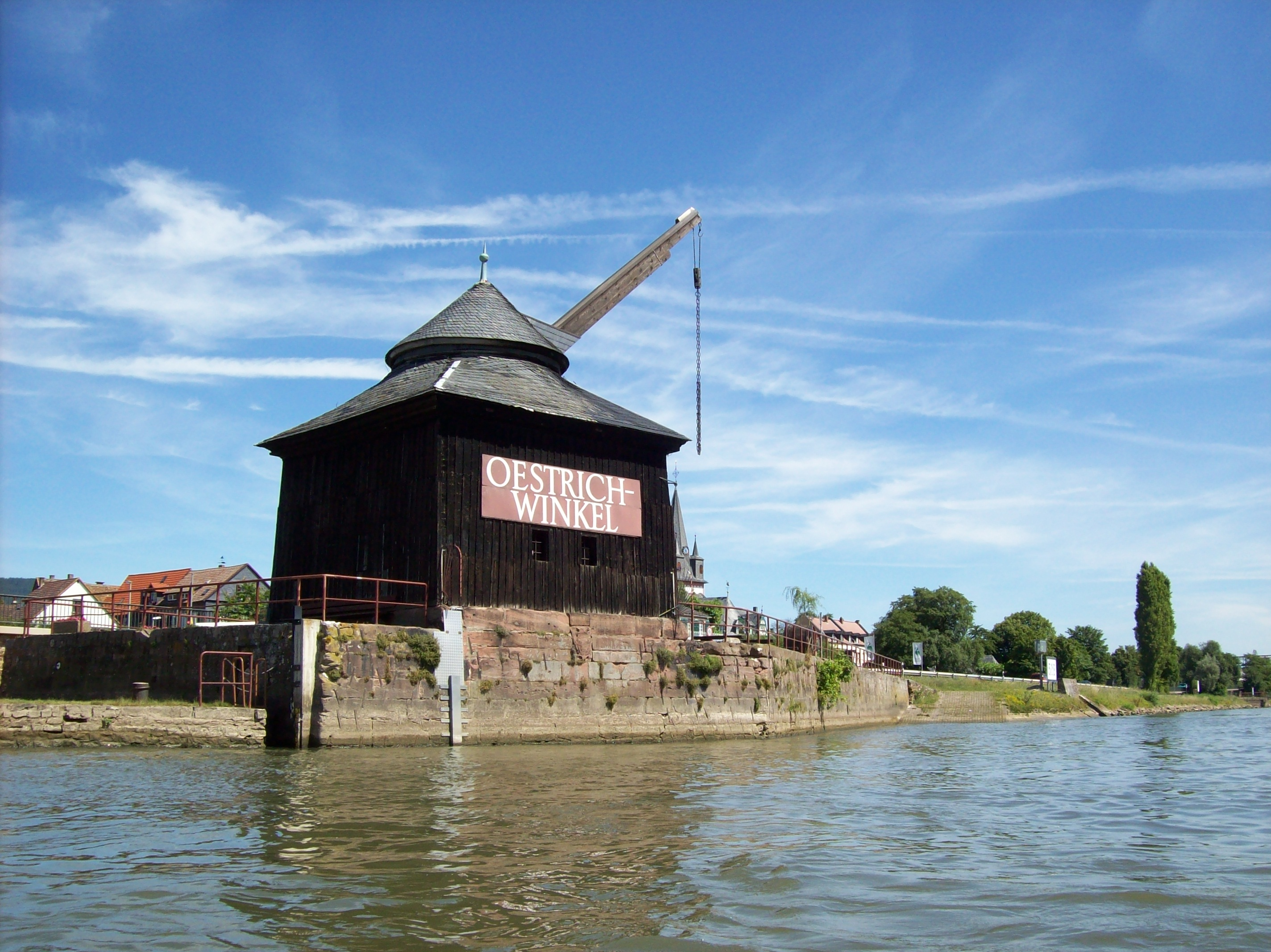 Kran von Oestrich, einschließlich Rheinpegel Oestrich, Ansicht vom Fluss aus